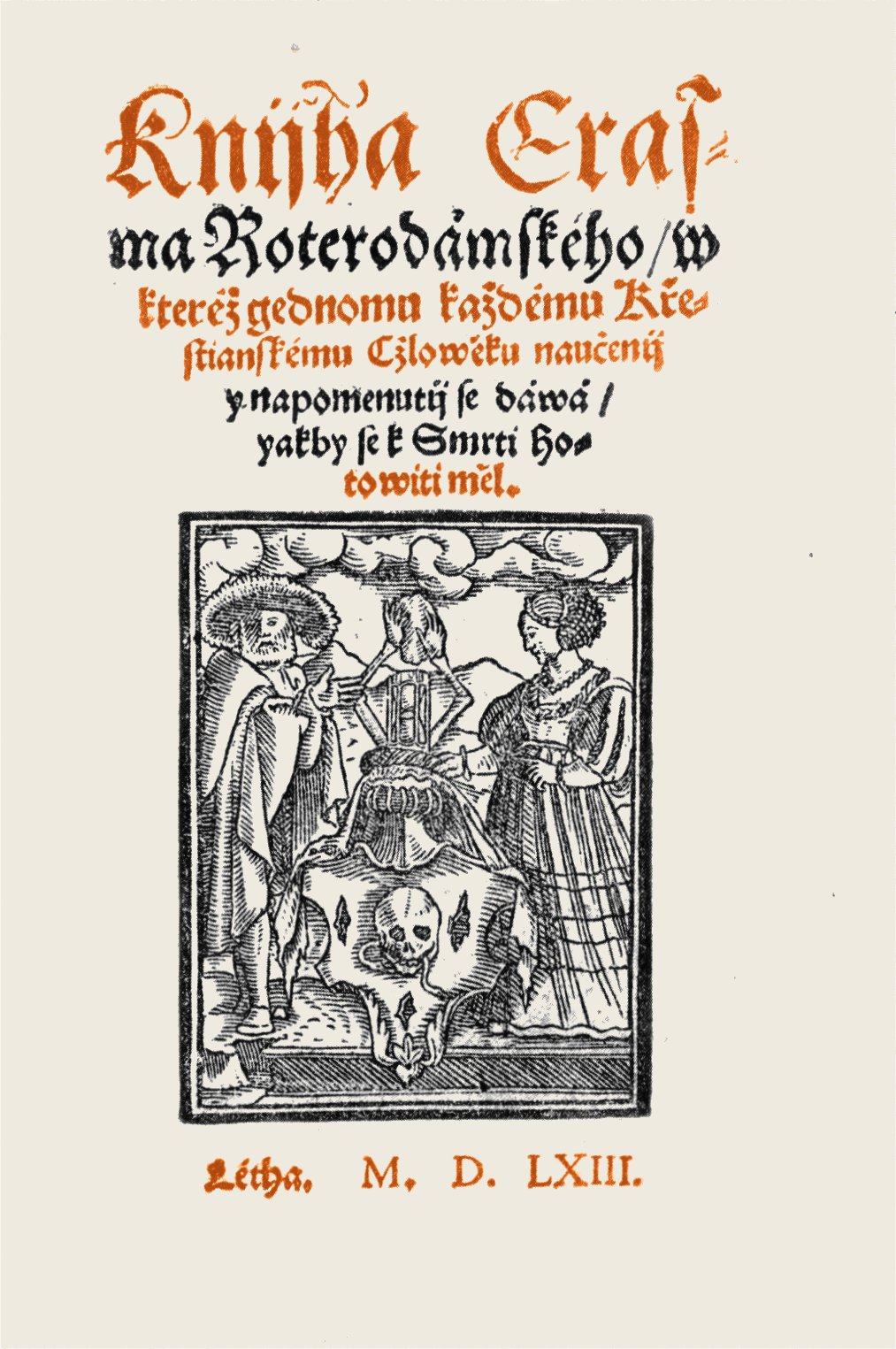 Erasmus Rotterdamský Hotovení se k smrti - titulní list